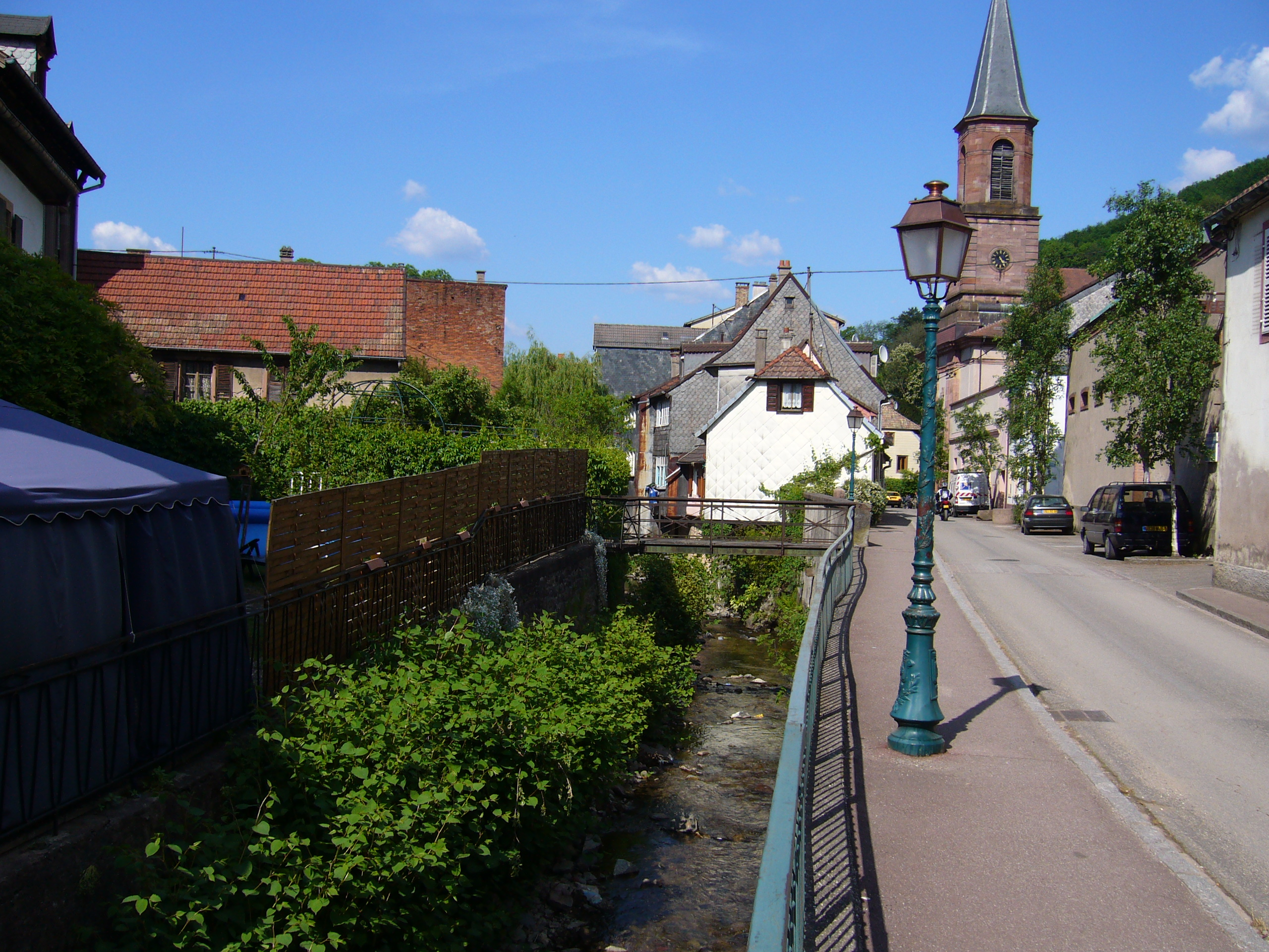 Vue sur la Liepvrette et l'église Saint-Louis à Ste Marie-aux-Mines